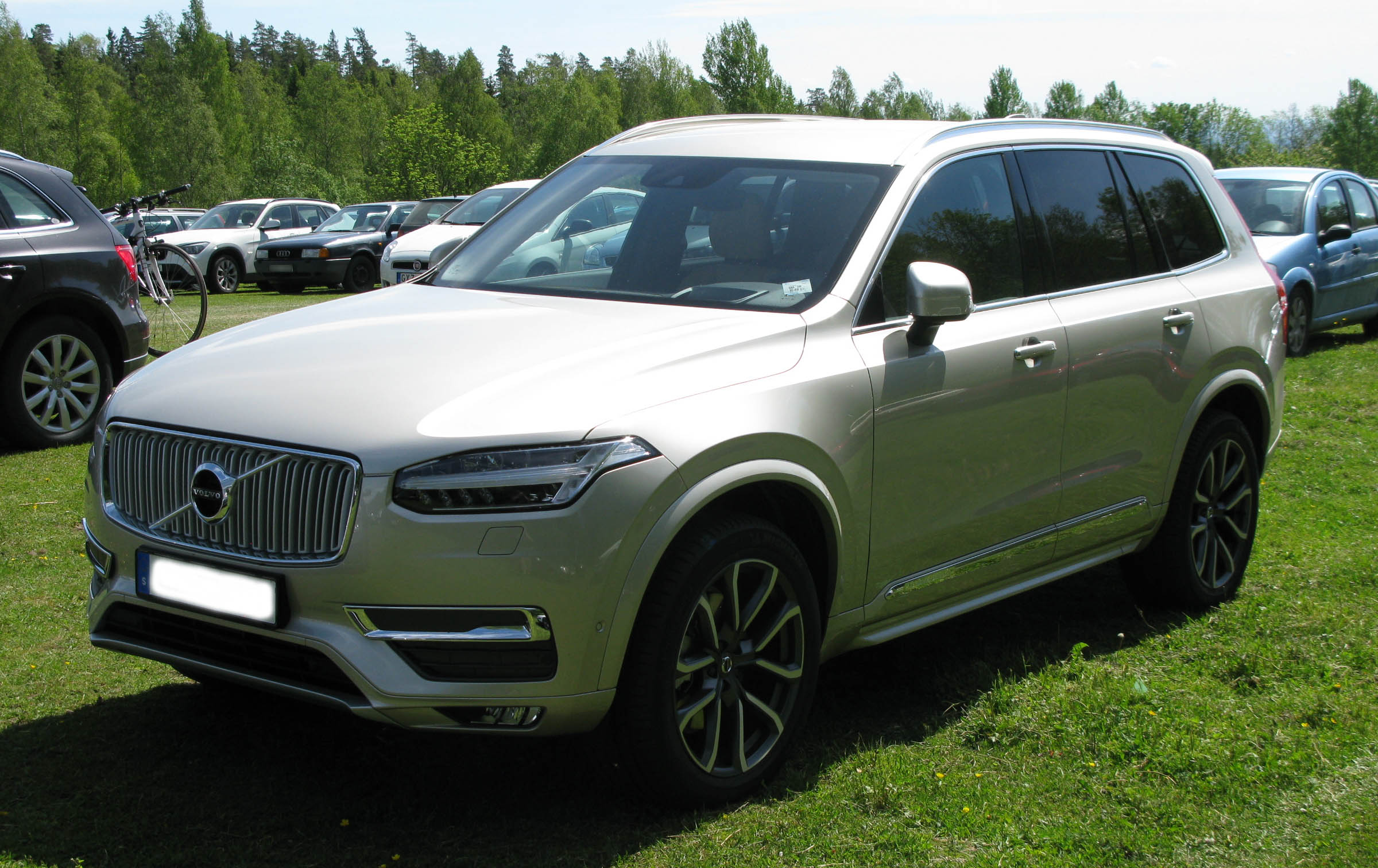 2015 Volvo XC90 Inscription